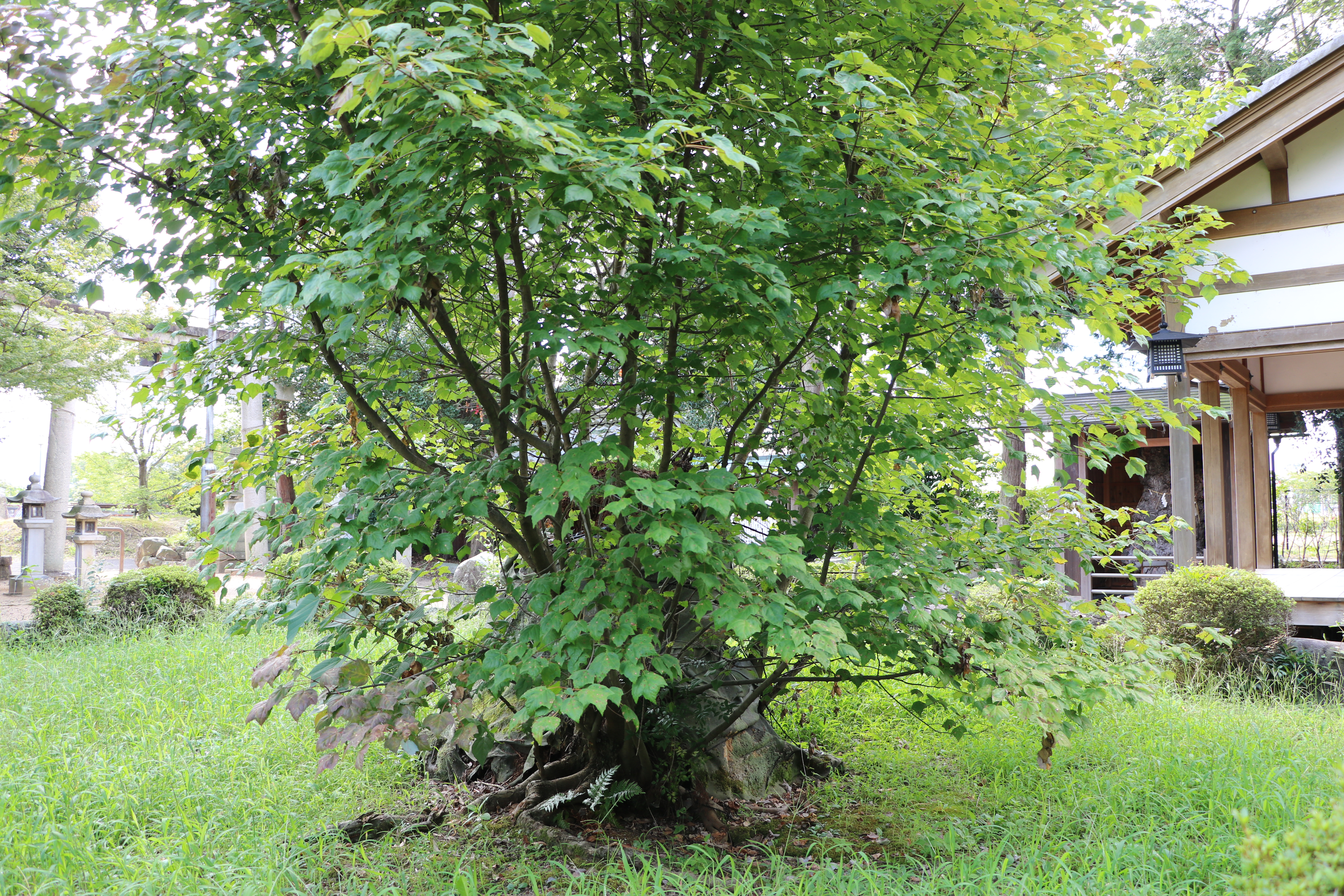 南花沢のハナノキ（国指定天然記念物、滋賀県東近江市）